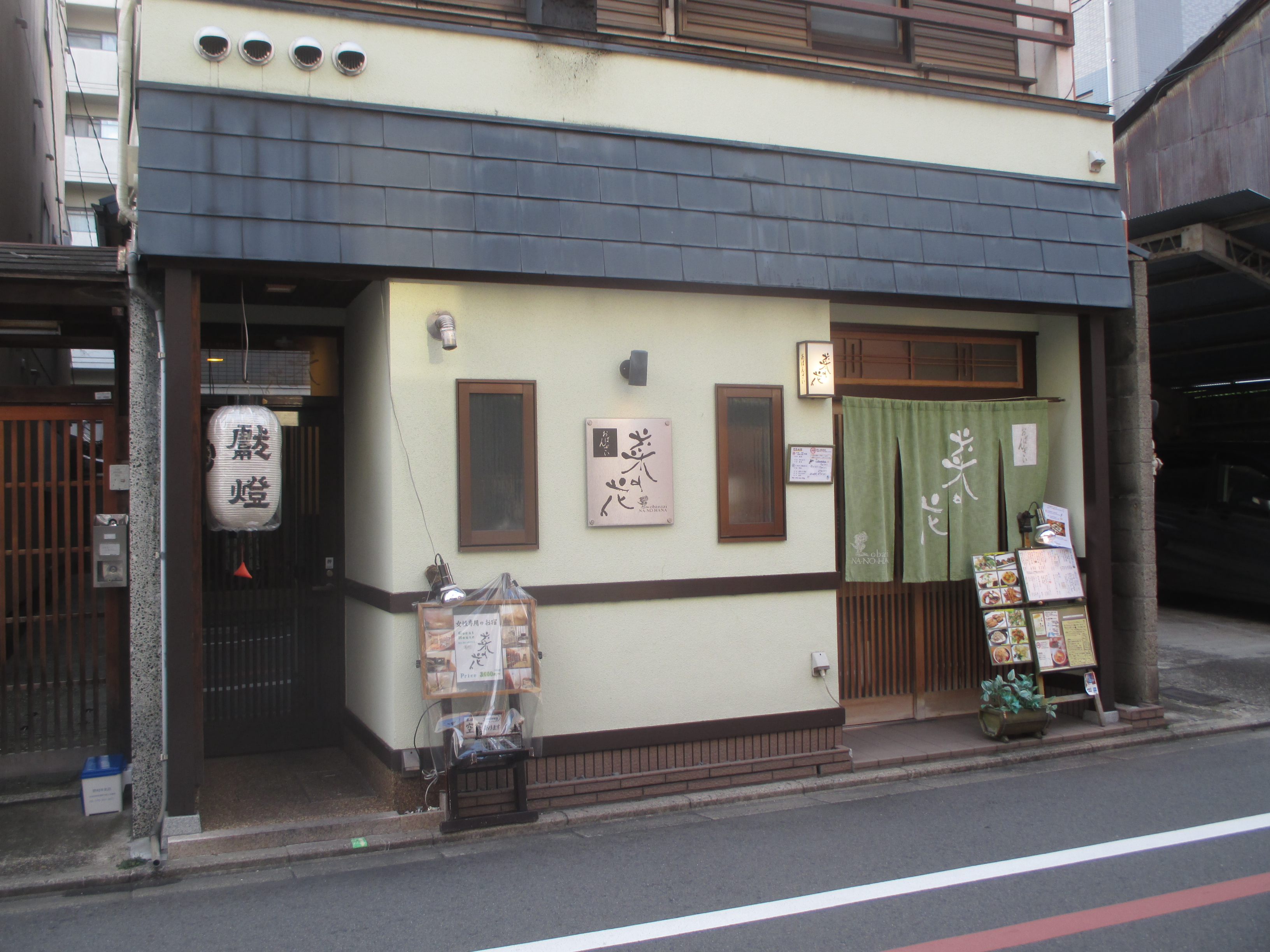 ゲストハウス 菜の花 Guest-house Hanohana